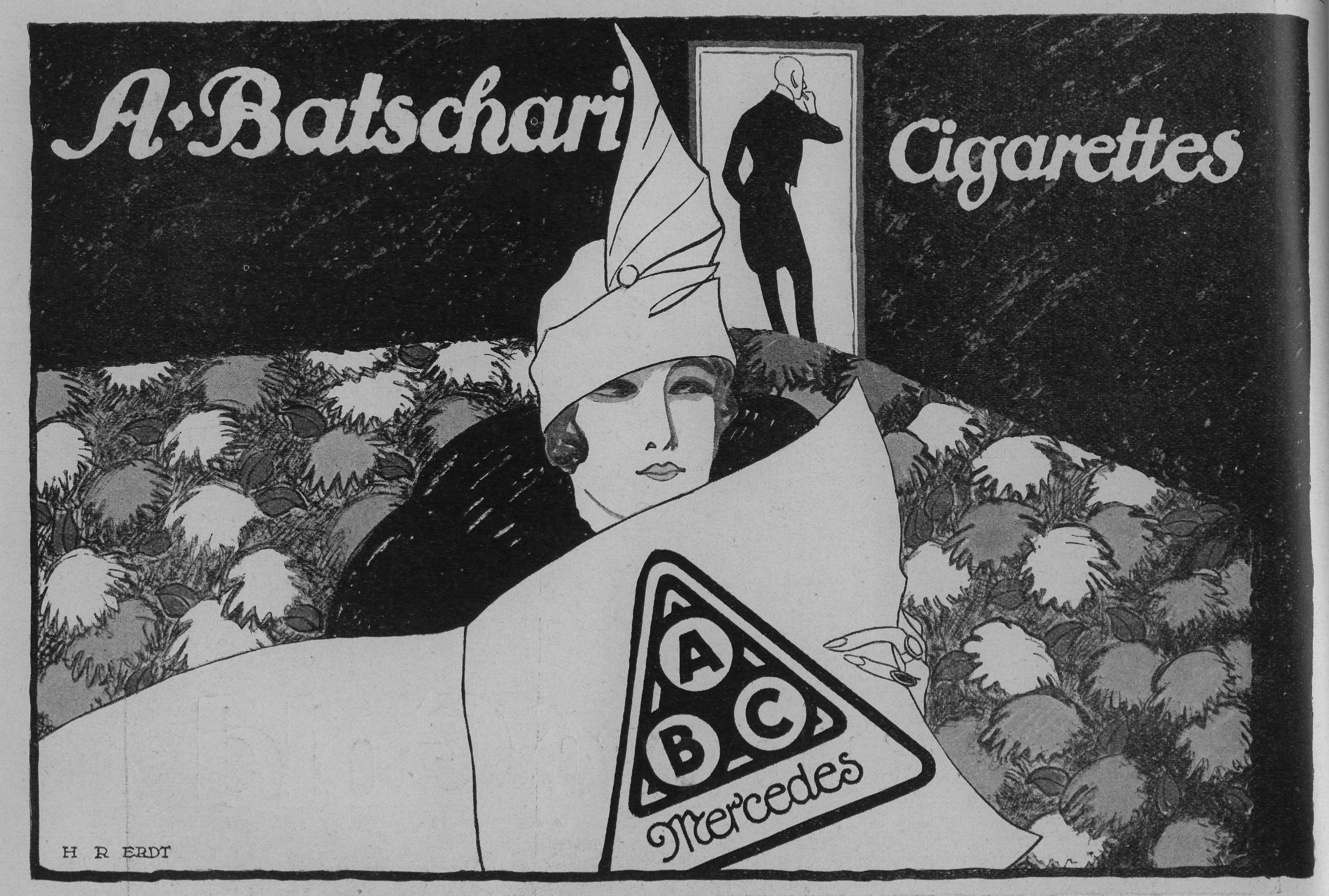 Das Bild zeigt eine Frau, die auf dem Sofa Zeitung liest. Die Zeitung zeigt die Marke "ABC" [gleich] August Batschari Cigaretten. Im Hintergrund erkennt man einen gut gekleideten Herrn, der in der Tür stehend eine Zigarette raucht.